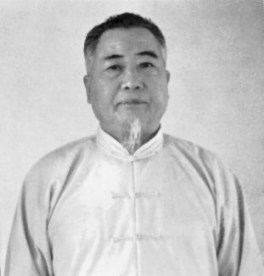 M° Chang Dsu Yao